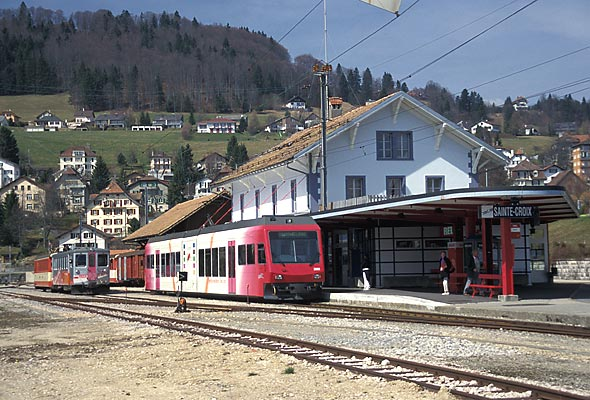 Ein Stadler-Gelenktriebwagen im Bahnhof von Ste-Croix, 2. April 2002. Sainte-Croix VD, Kanton Waadt, Schweiz.